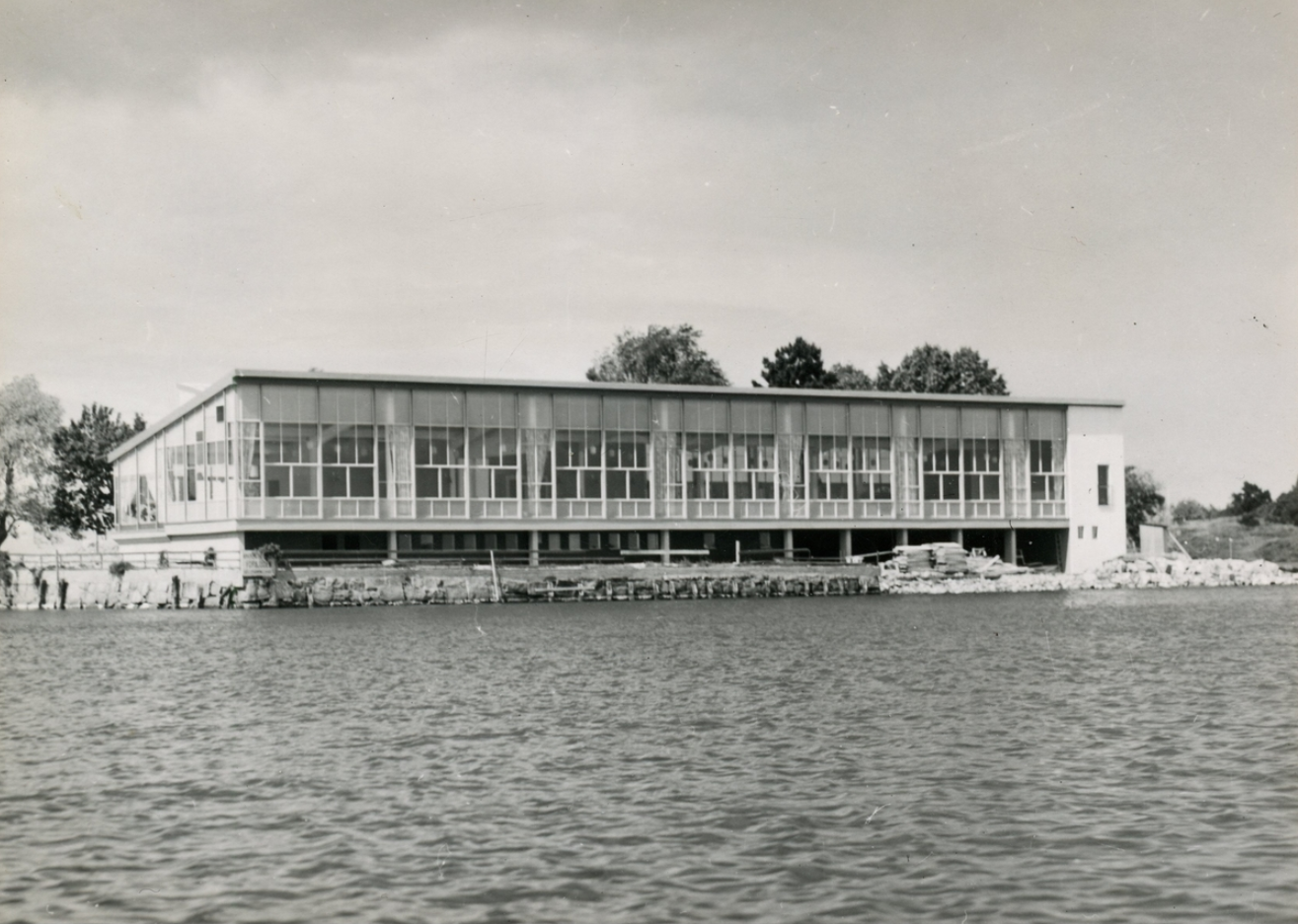 Restaurang Slottsholmen, Västervik. Byggnadsår 1950-1952. Rivet 2014.